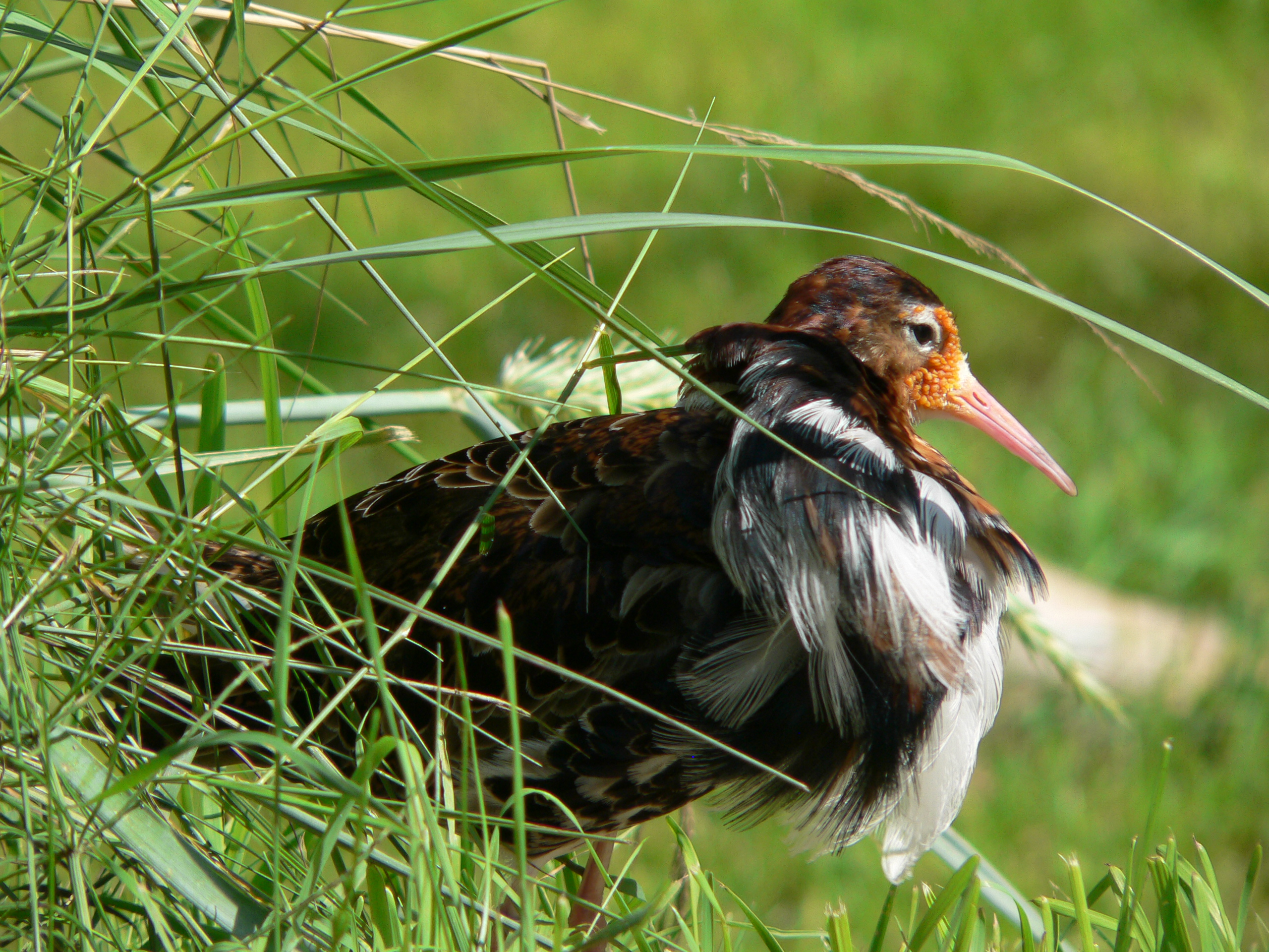 bird